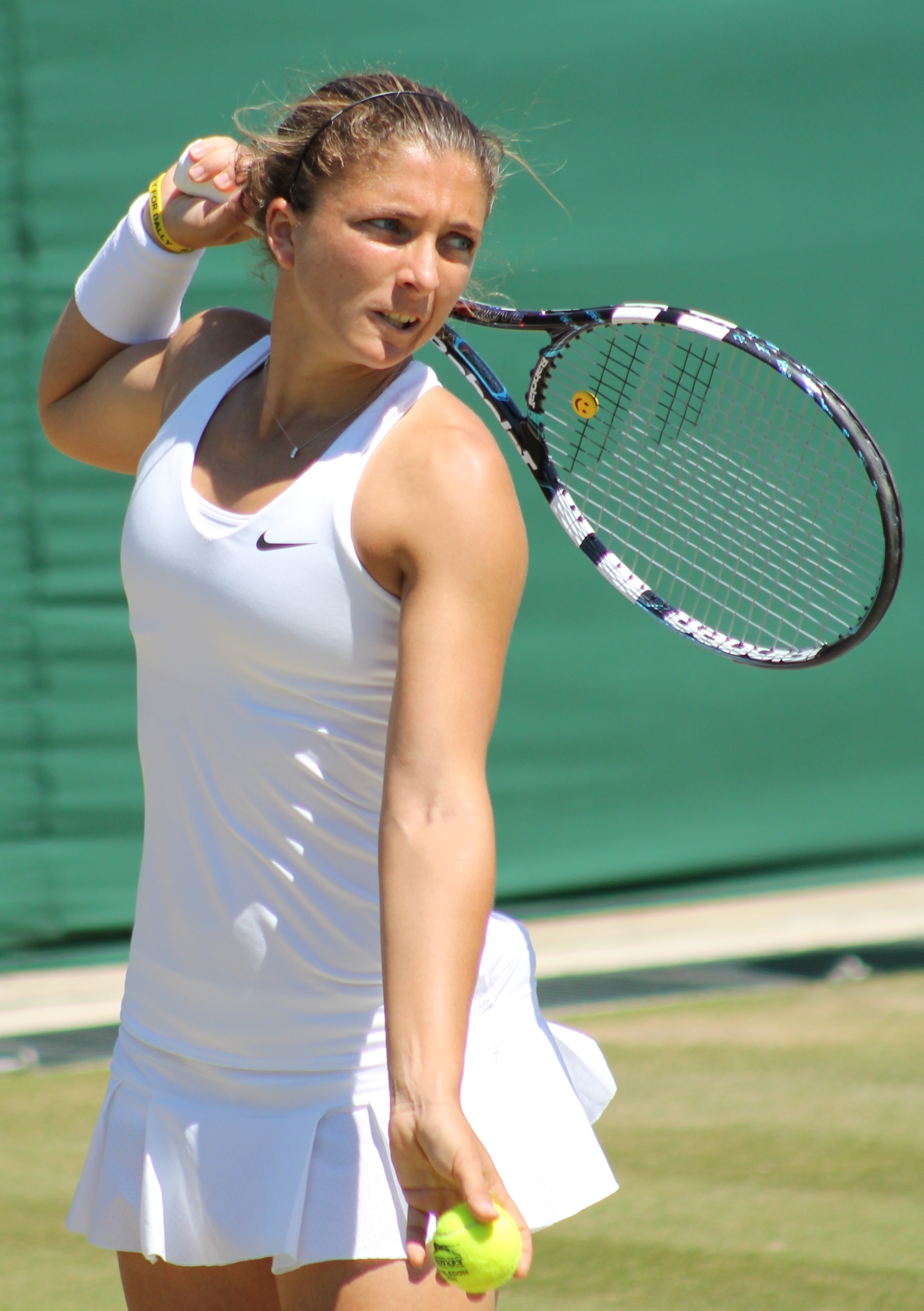 Errani WM14 (9)